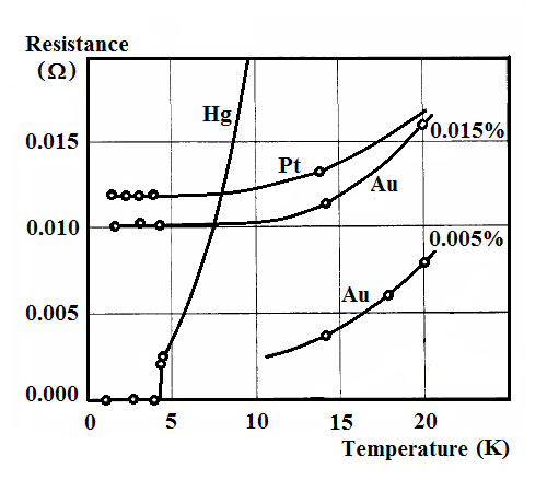 電阻對溫度曲線